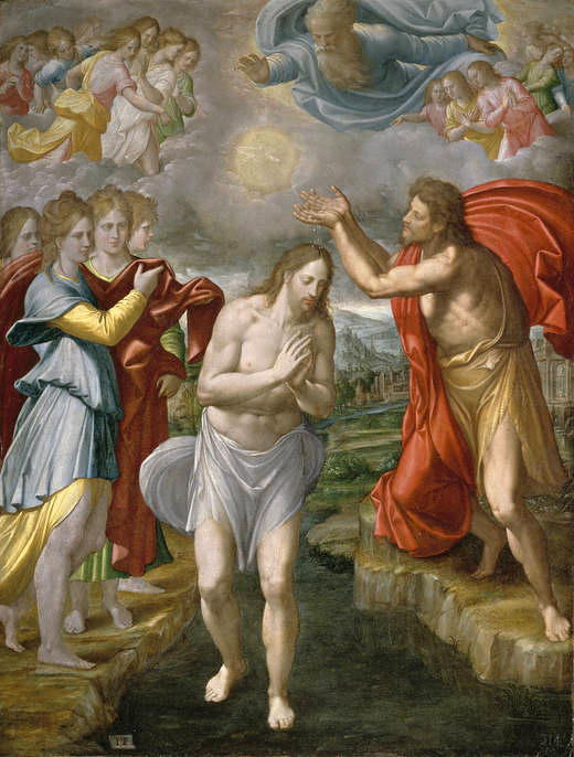 Bautismo de Cristotitle QS:P1476,es:"Bautismo de Cristo" label QS:Les,"Bautismo de Cristo"